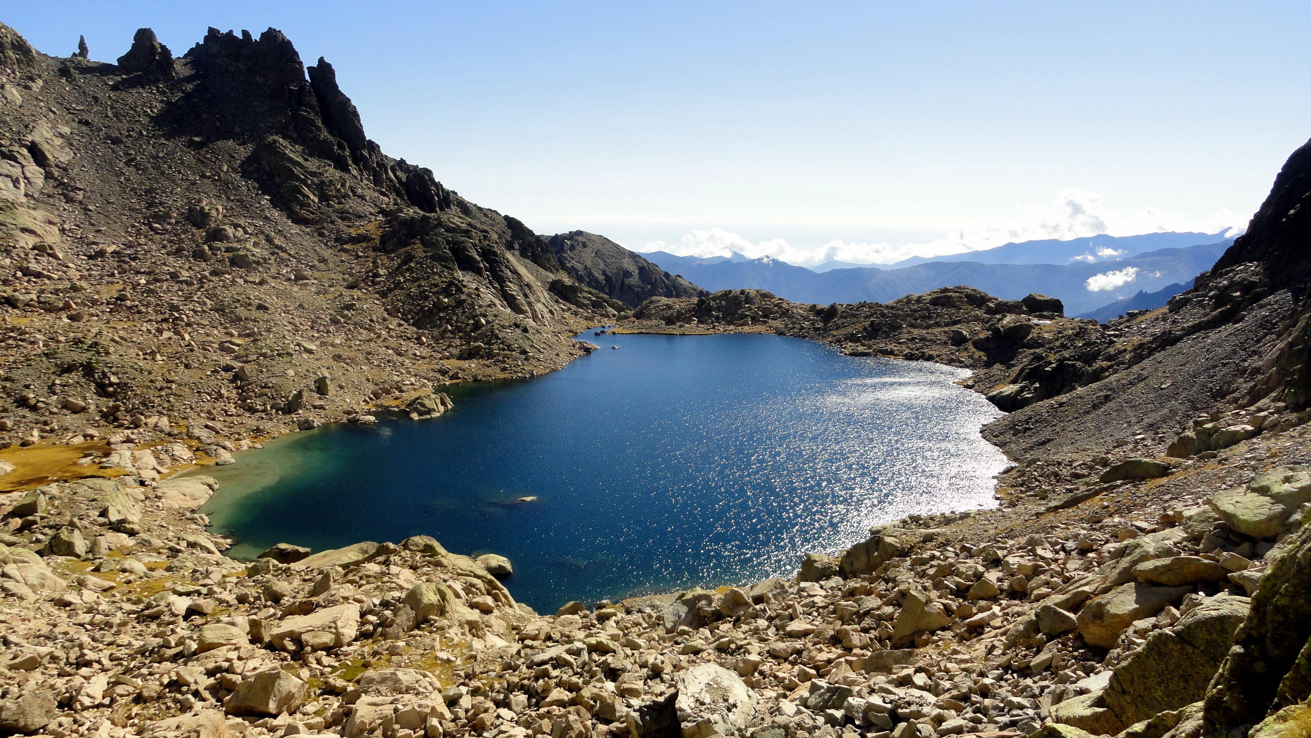 Le lac de Betaniella, Monte Rotondo, Corse